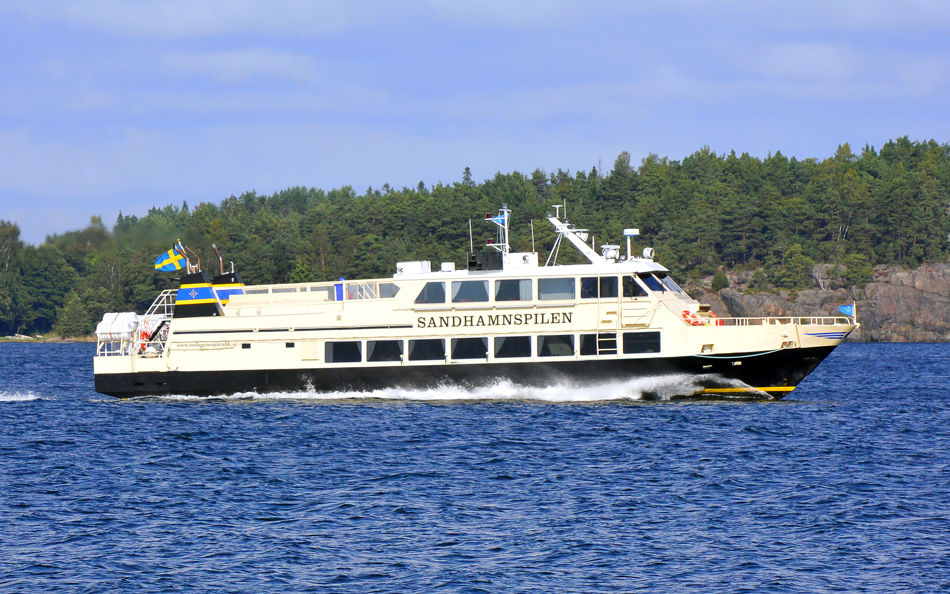 M/S Tärnan of Söderöra på väg från Stavsnäs till Sandhamn genom Eknösundet.